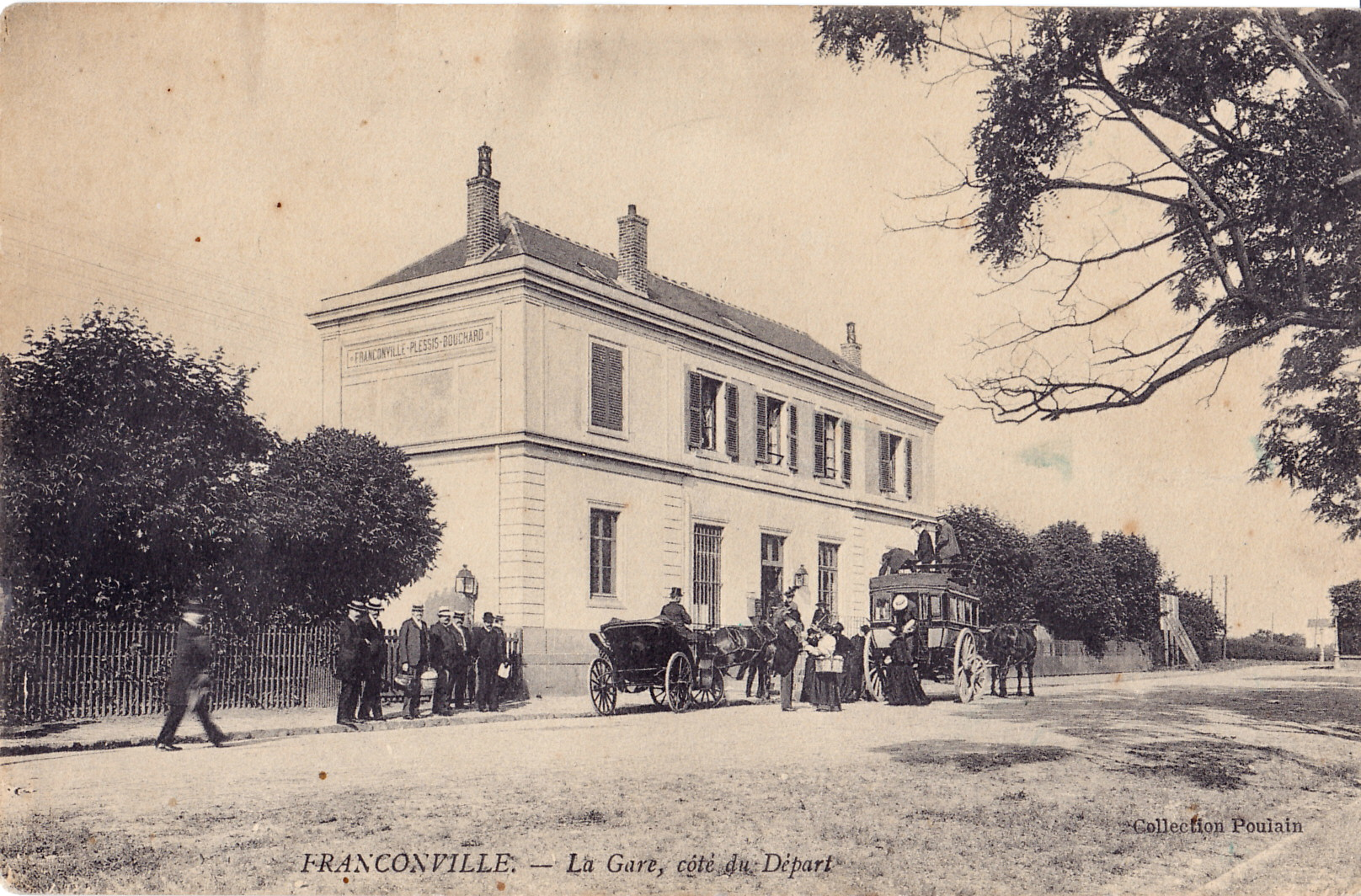 Carte postale ancienne éditée par Poulain : FRANCONVILLE - La Gare